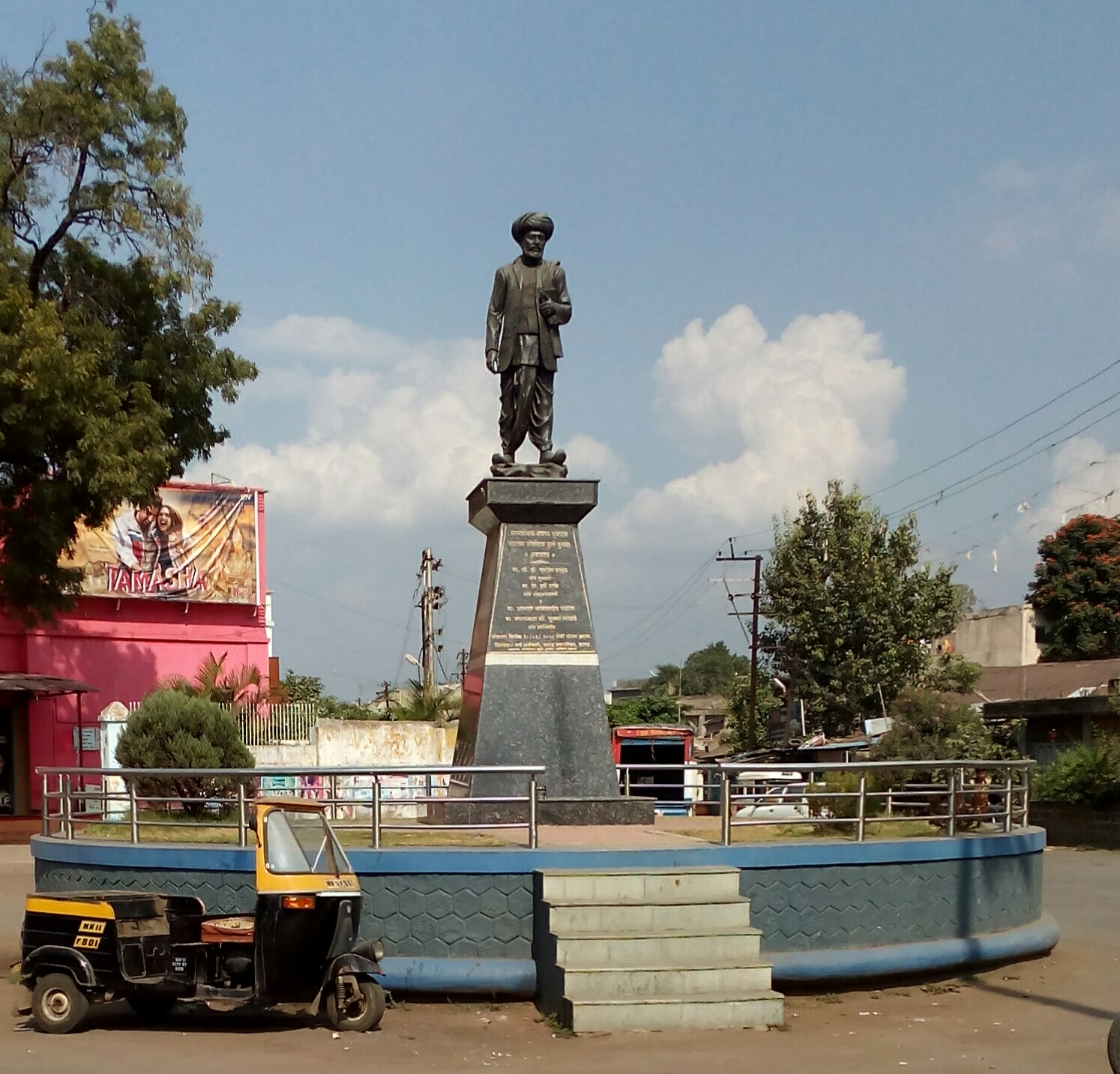 कराड, सातारा में स्थित एक ज्योतिबा फुले की मूर्ति